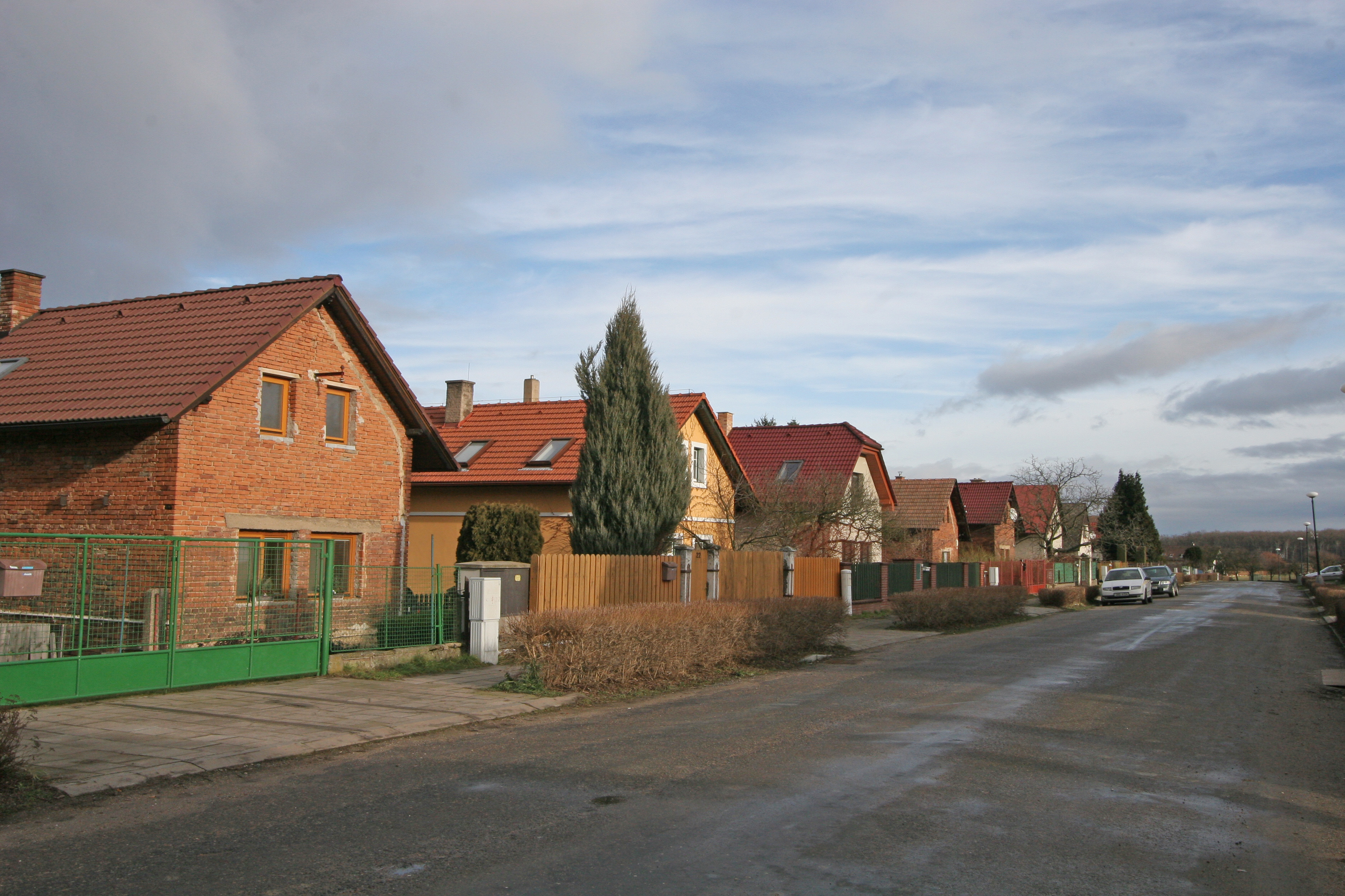 Michnovka směr Kratonohy